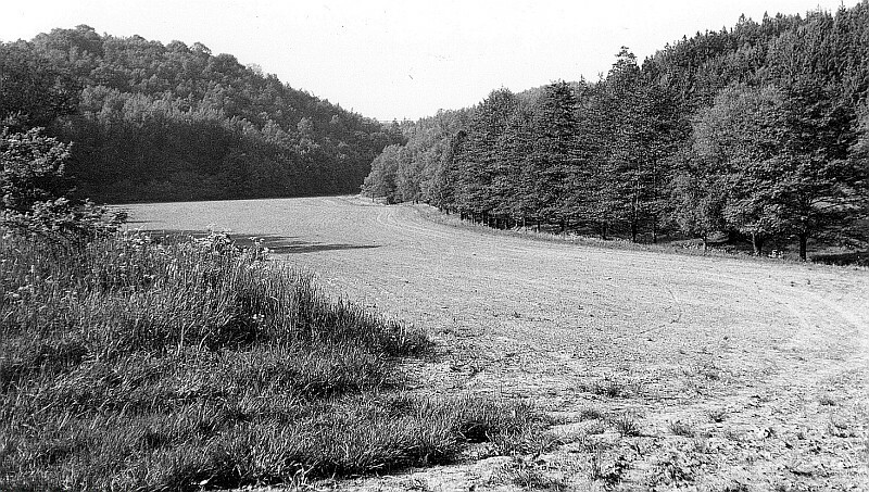 Original image description from the Deutsche FotothekTriebischtal-Tanneberg. Triebischlandschaft bei der Eulenmühle